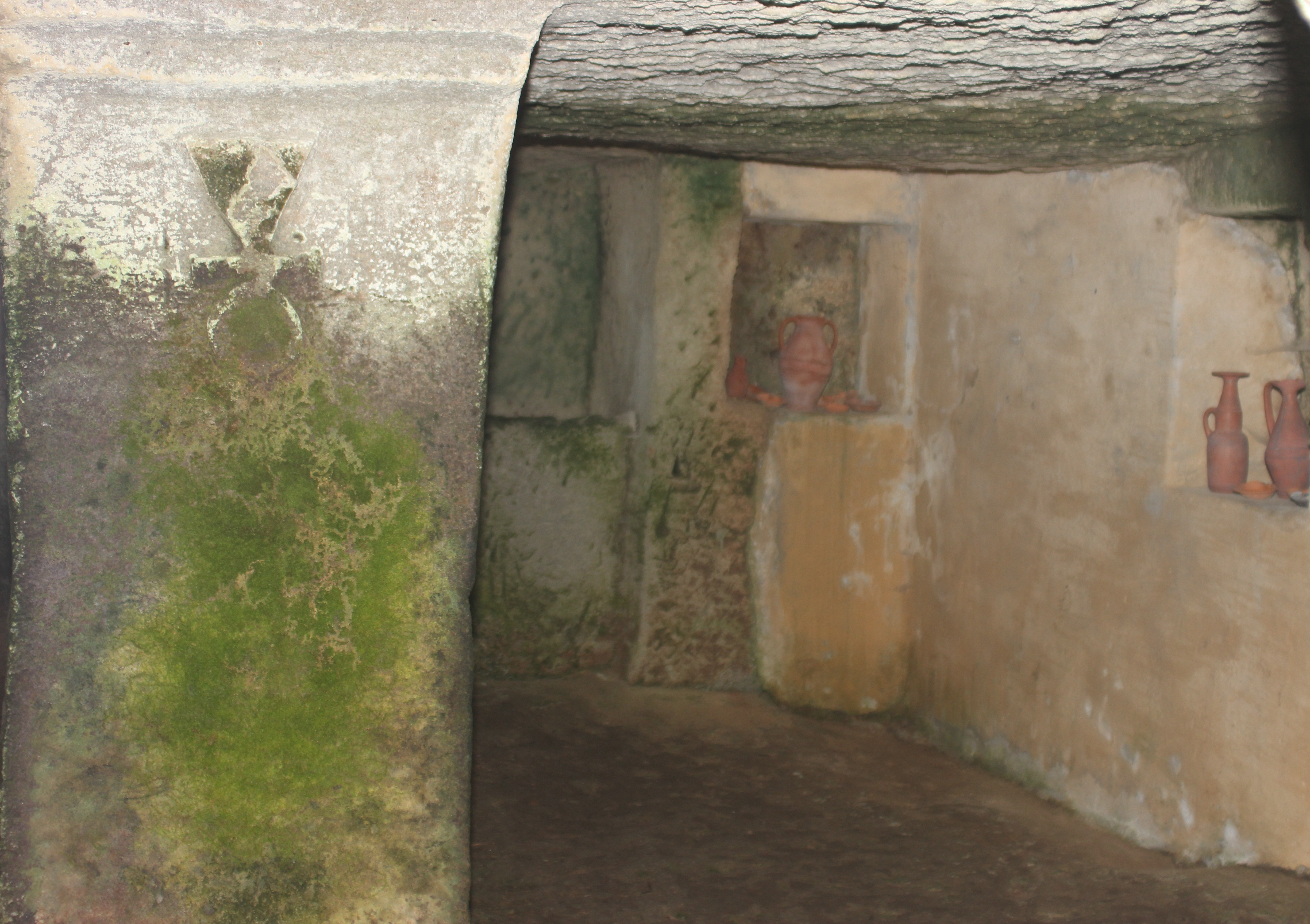 Area archeologica di Monte Sirai - MIBAC; interno tomba della necropoli fenicia con rilievo della dea Tanit e corredo funerario This is a photo of a monument which is part of cultural heritage of Italy.